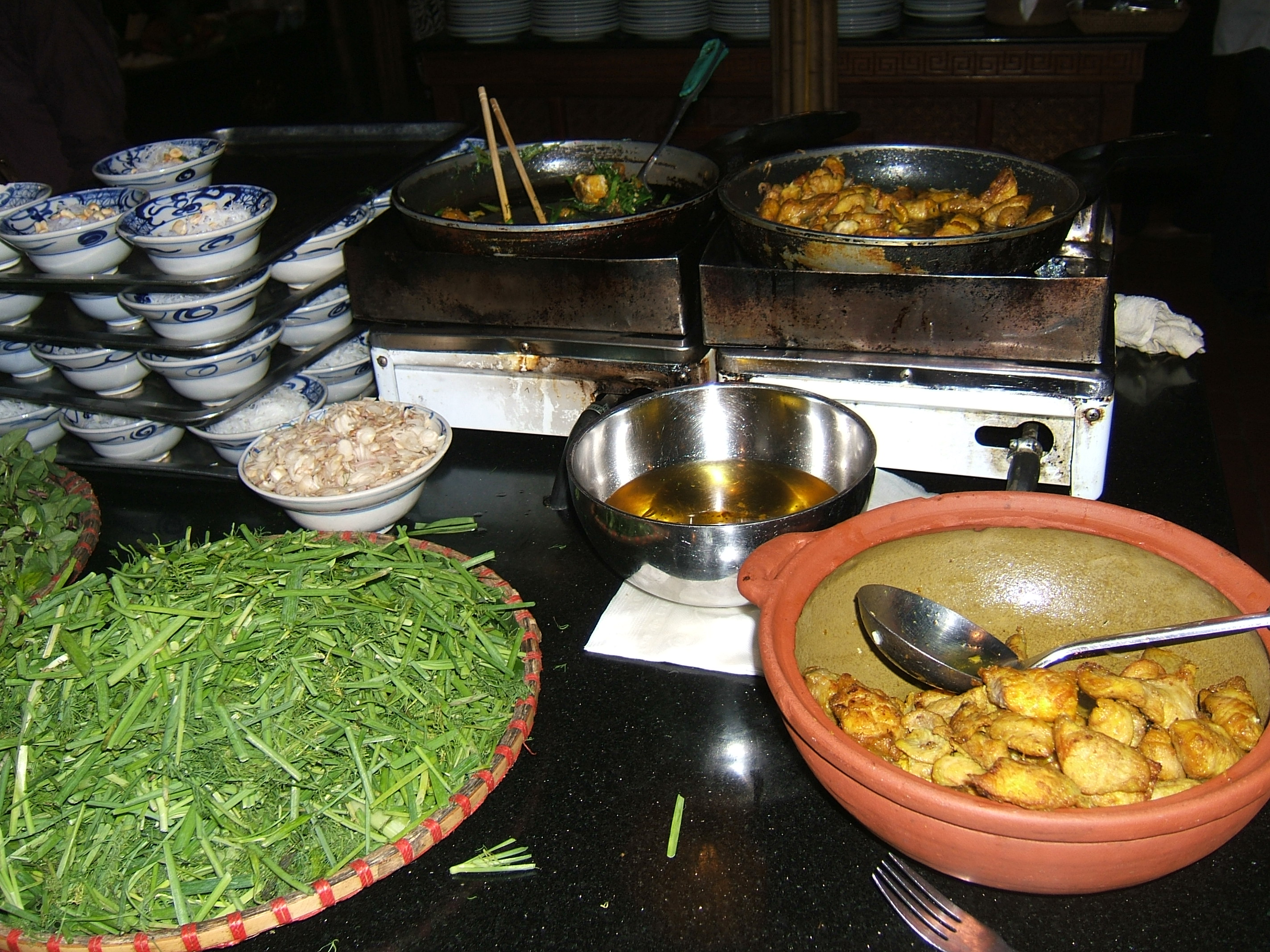 Ảnh do Khương Việt Hà thực hiện tại Hà Nội